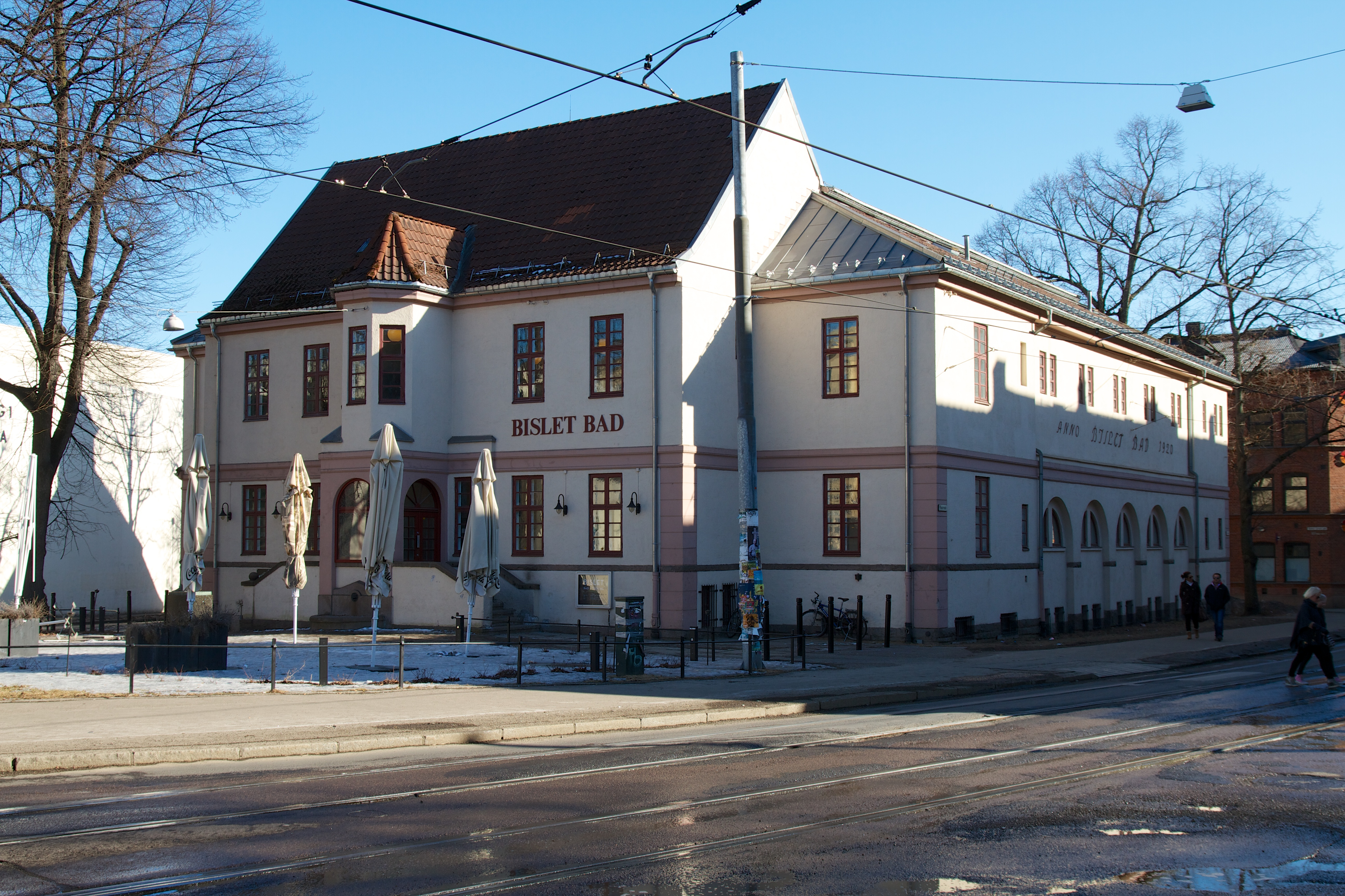 Bislet bad - Oslo